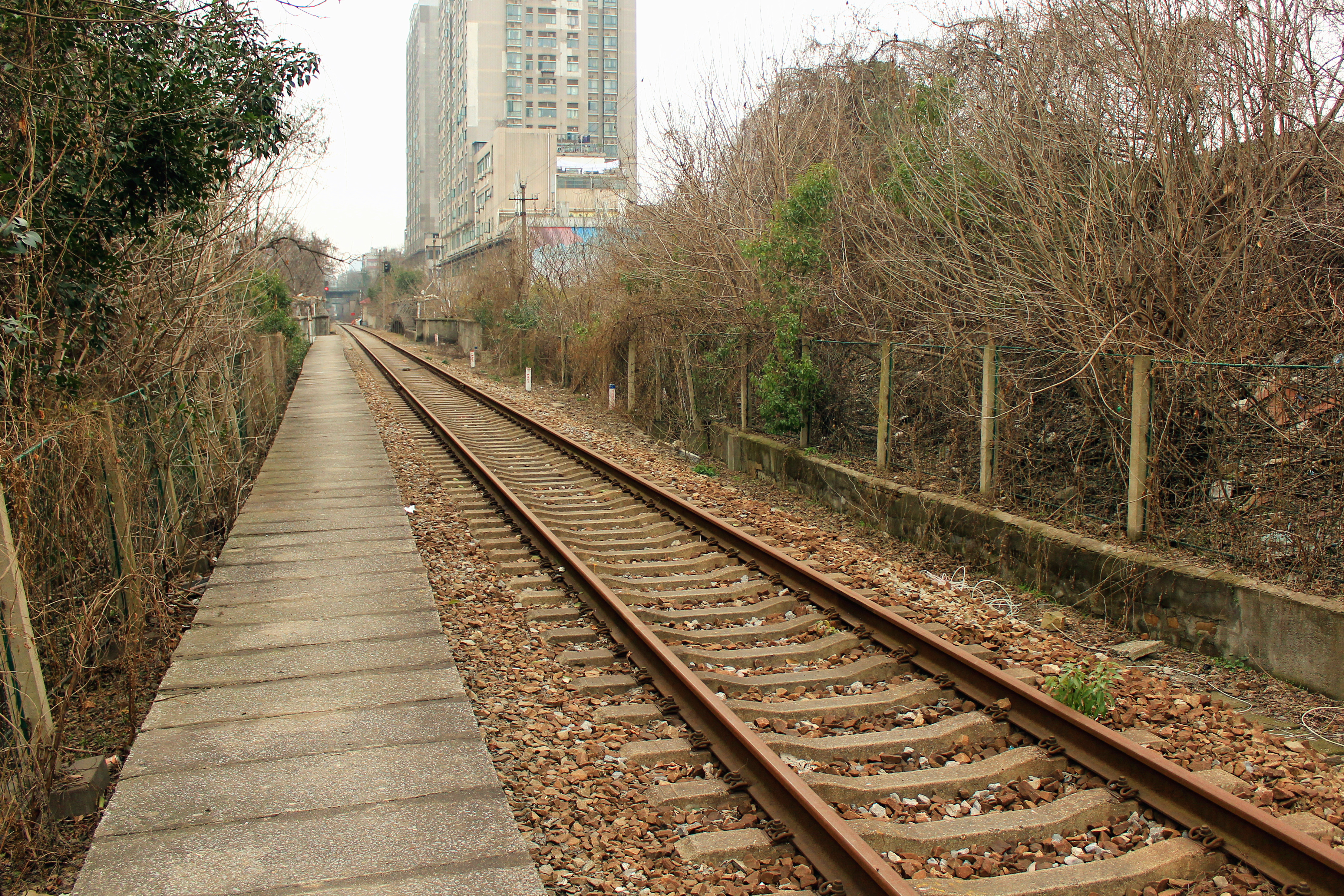 中文（中国大陆）: 武九铁路武昌北环线小东门乘降所